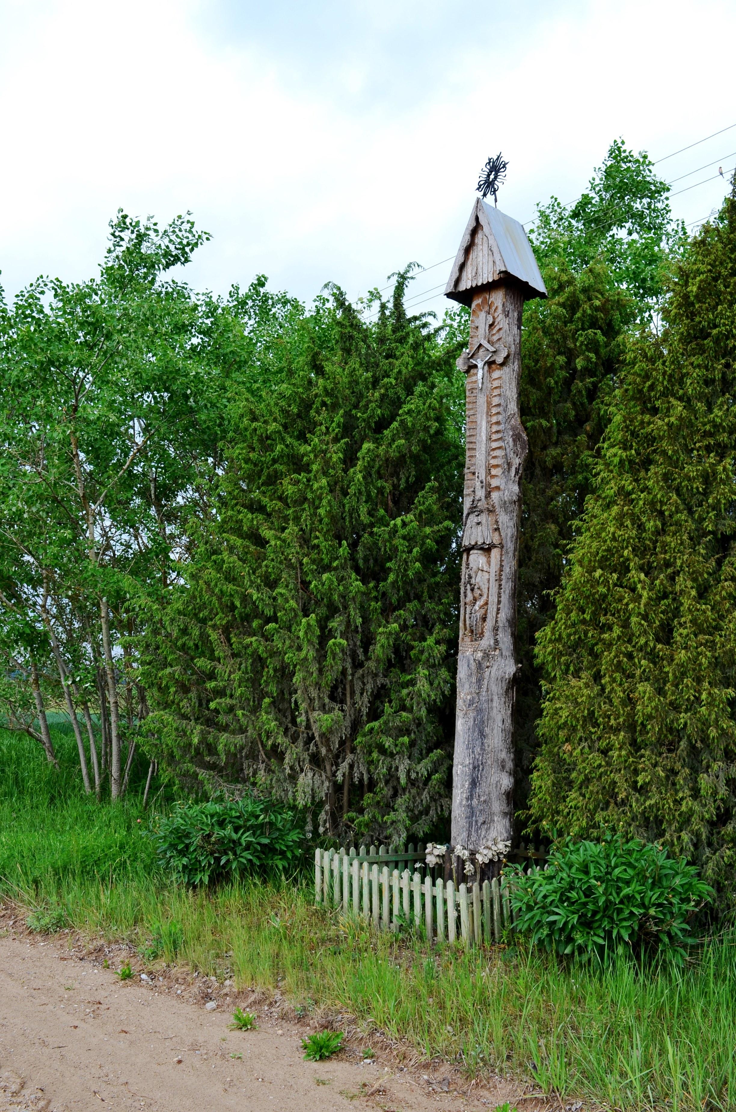 Stogastulpis Daužnagiuose, Radviliškio r.